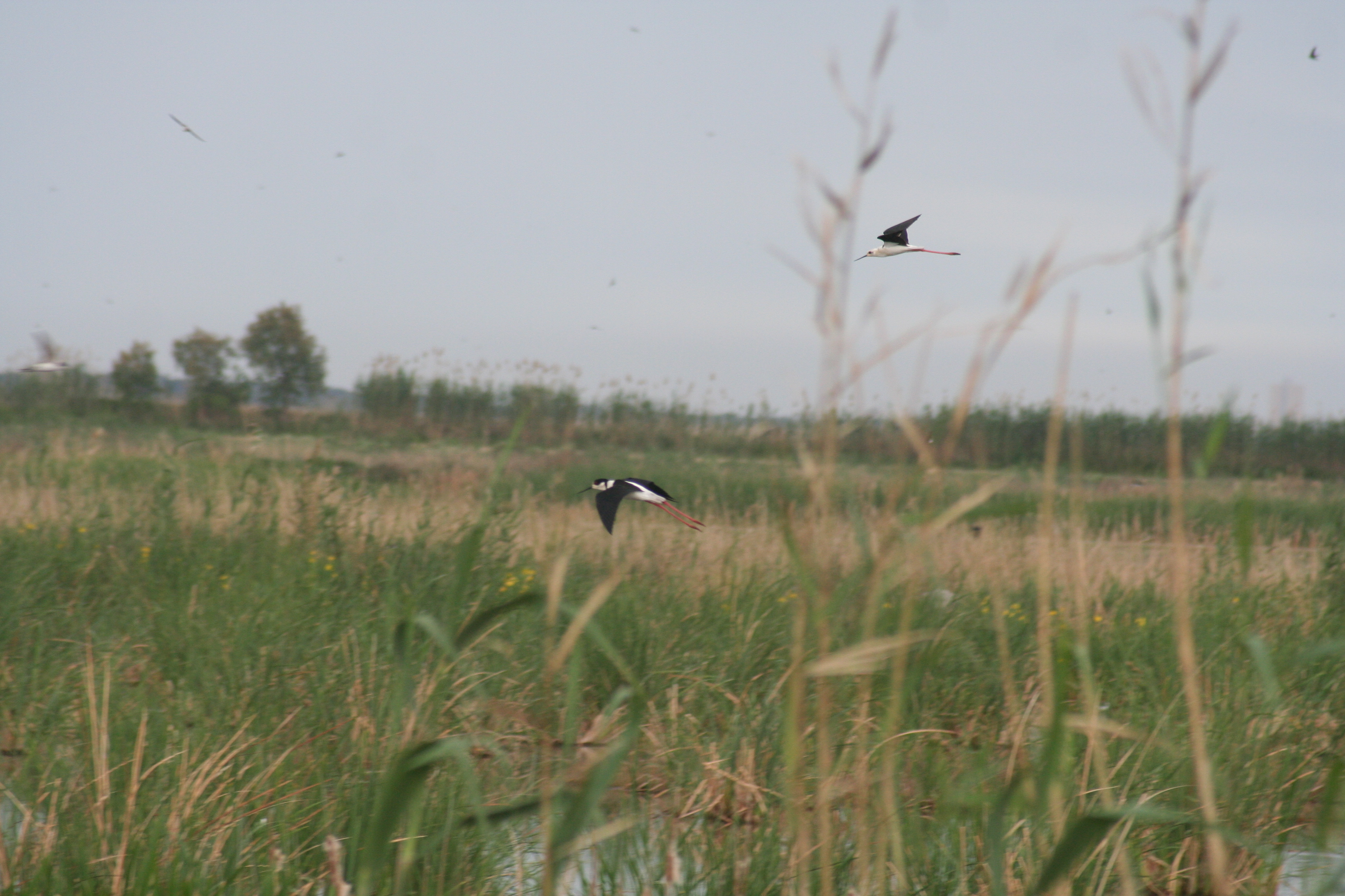 Cigüeñuelas (Himantopus himantopus) volando en el Tancat de la Pipa (Valencia).